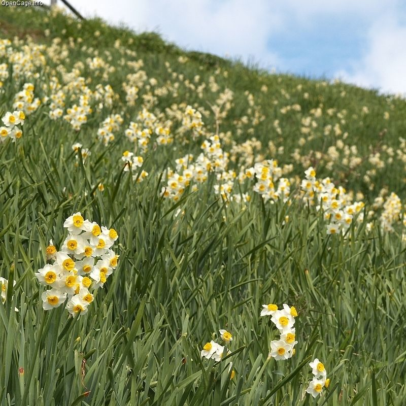 スイセン（ニホンズイセン） Narcissus tazetta L. var. chinensis Roemer Cenhinen Bedr Narzissen Narcisse (plante) Titelroas Narcissus poeticus Narcis Narcyz (roślina) Nergis 水仙